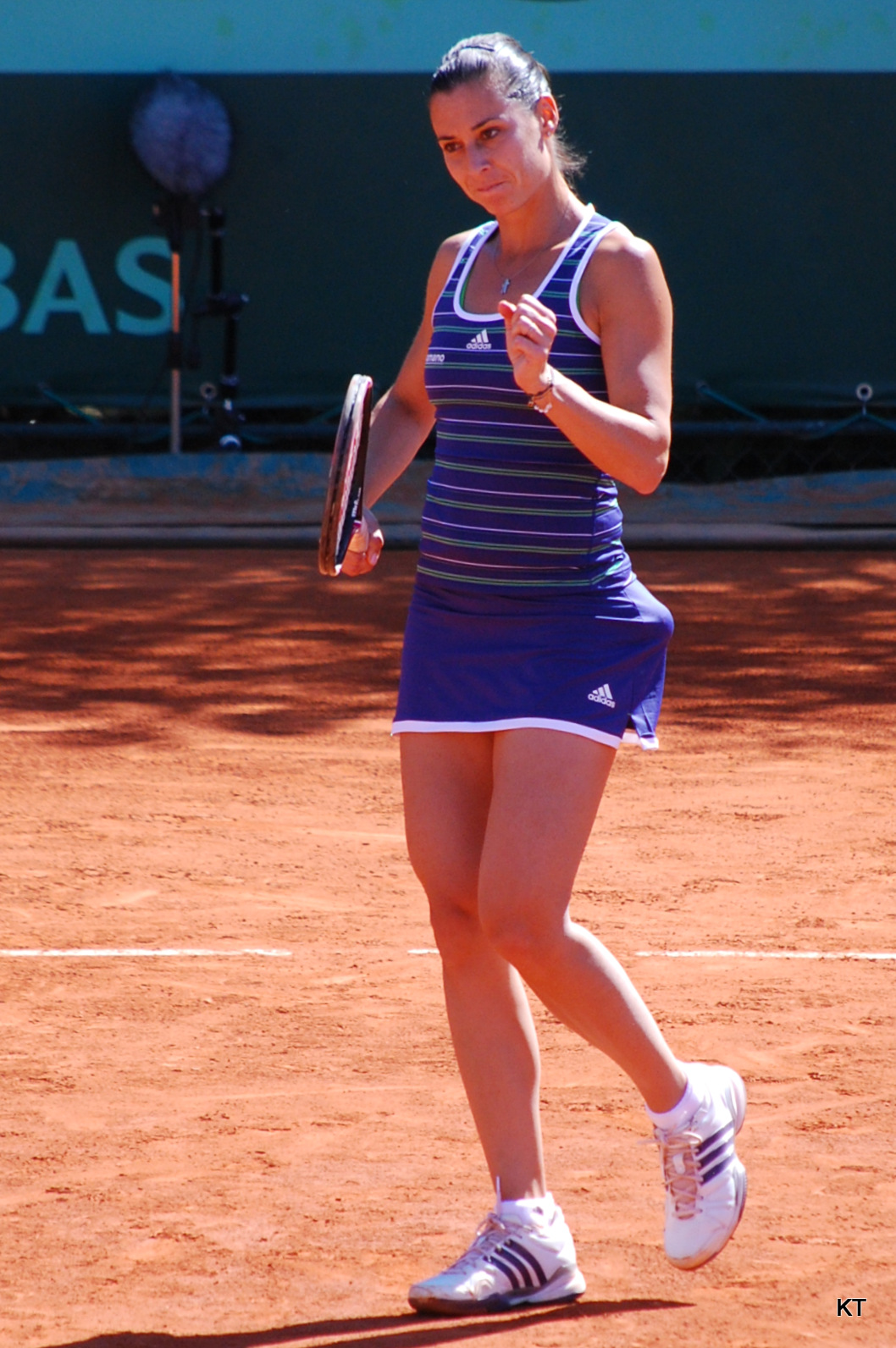 Roland Garros 2011.